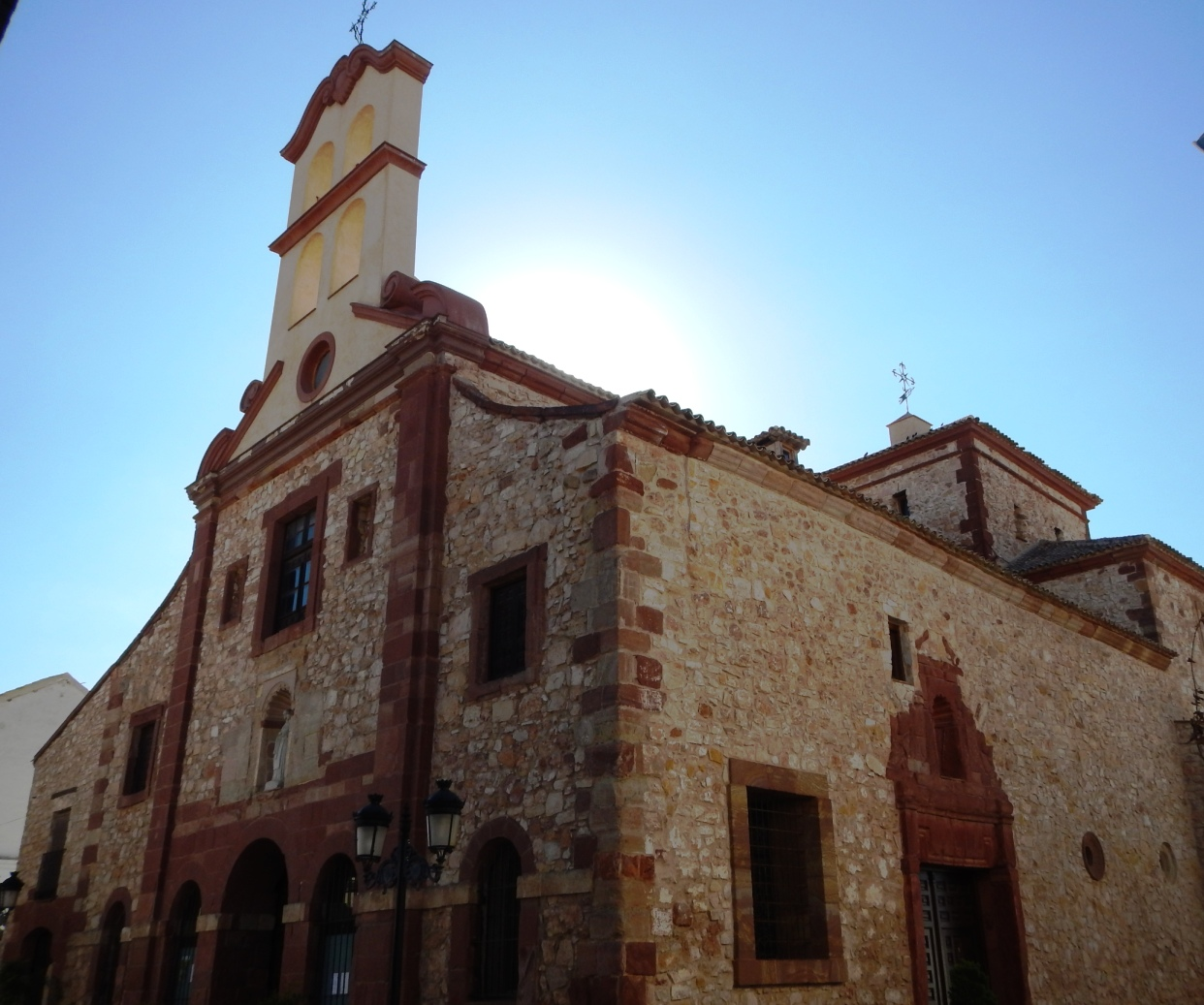 Iglesia del Convento de Carmelitas Descalzos en Campo de Criptana